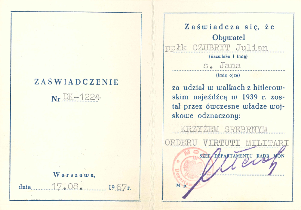 Legitymacja MON na VM